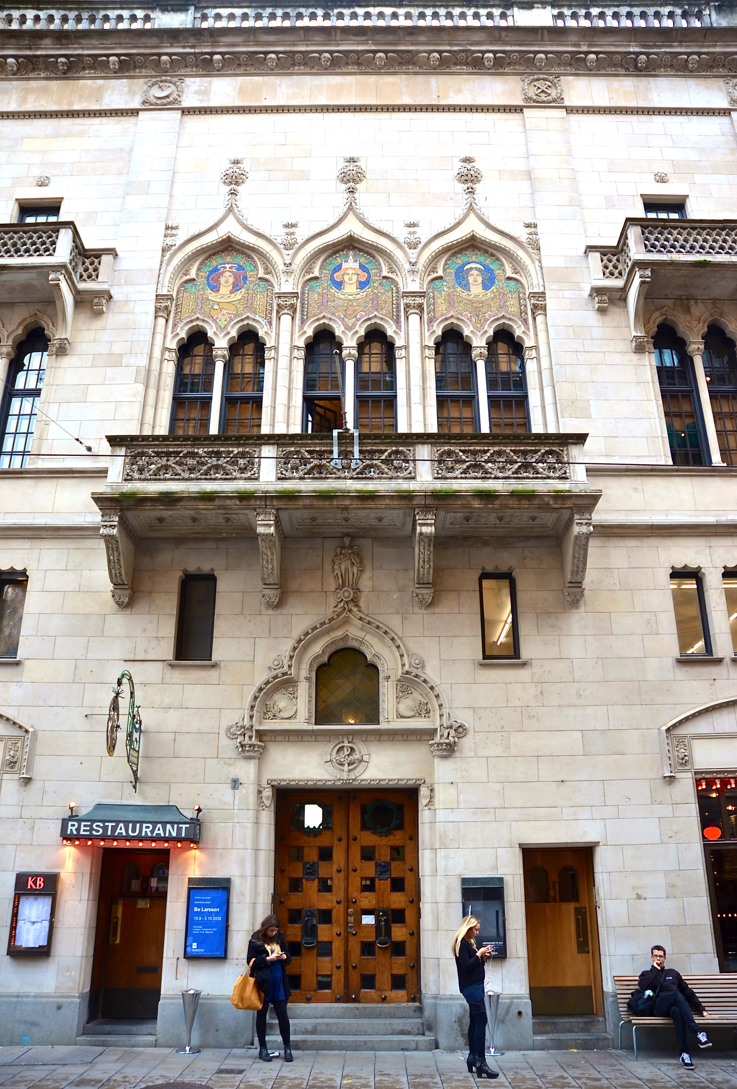 Konstnärshuset i Stockholm. Fasad är utförd i portlandkalksten. Arkitekt är Ludvig Peterson (1853-1931). Stilen inspirerad av sensoriska venetianska palats och inslag av jugendstil med stiliserade växtdekorationer som lövbollar, tistelbårder och rosor.